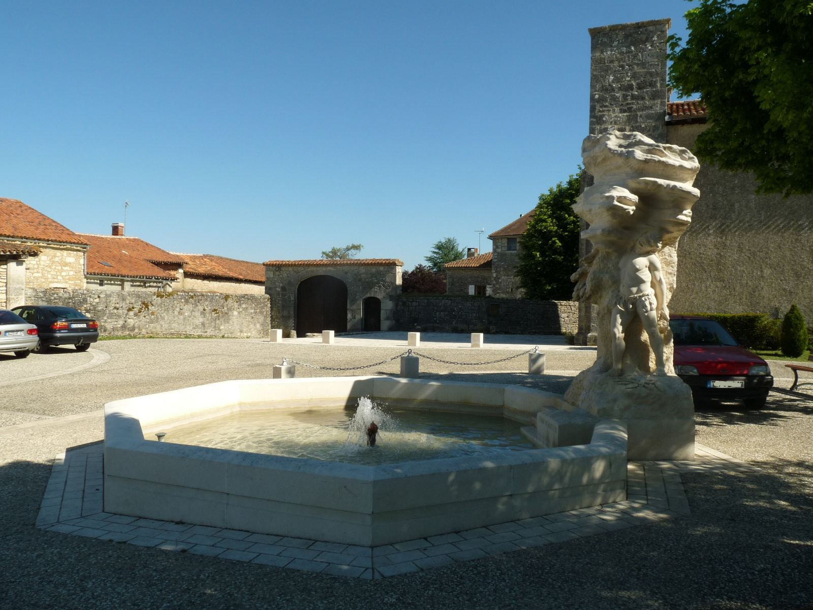 place de l'église de Marillac-le-Franc avec sculpture "L'Homme de Marillac", Charente, France